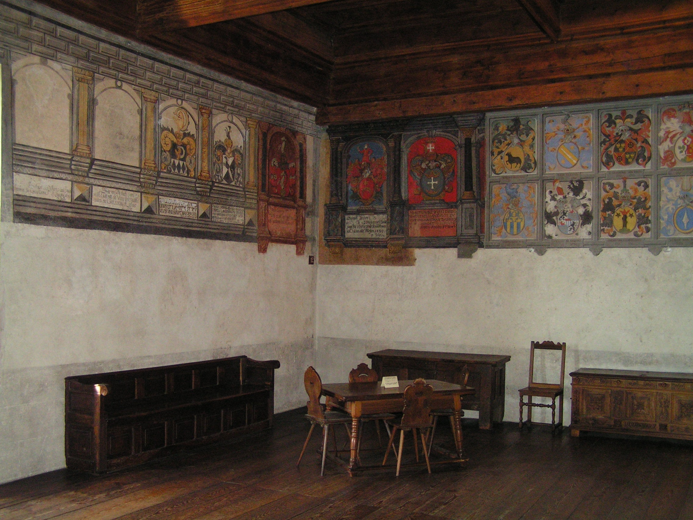 Saal im Schloss Chillon, Veytaux-Montreux, Schweiz